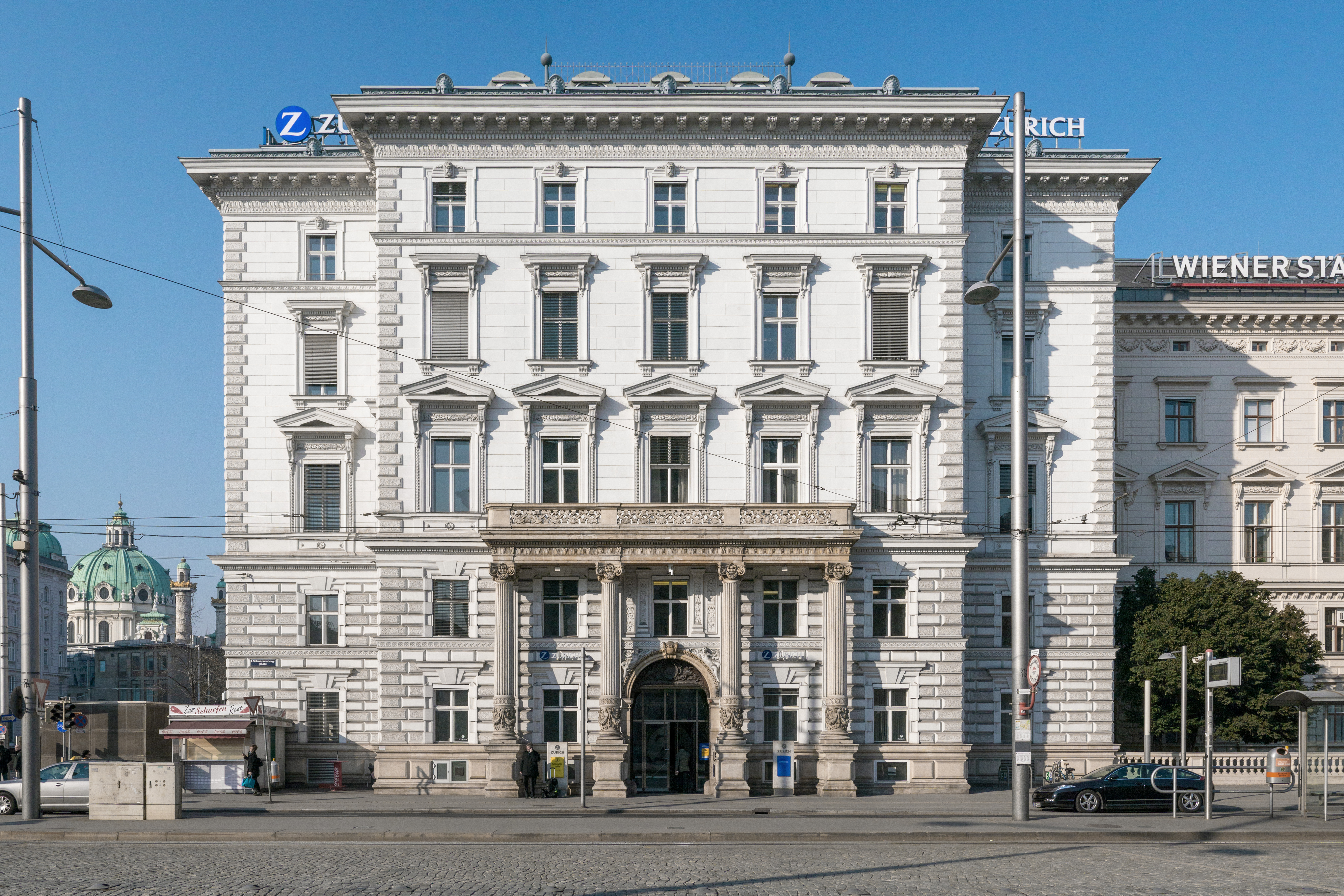 Ehem. Palais Ofenheim